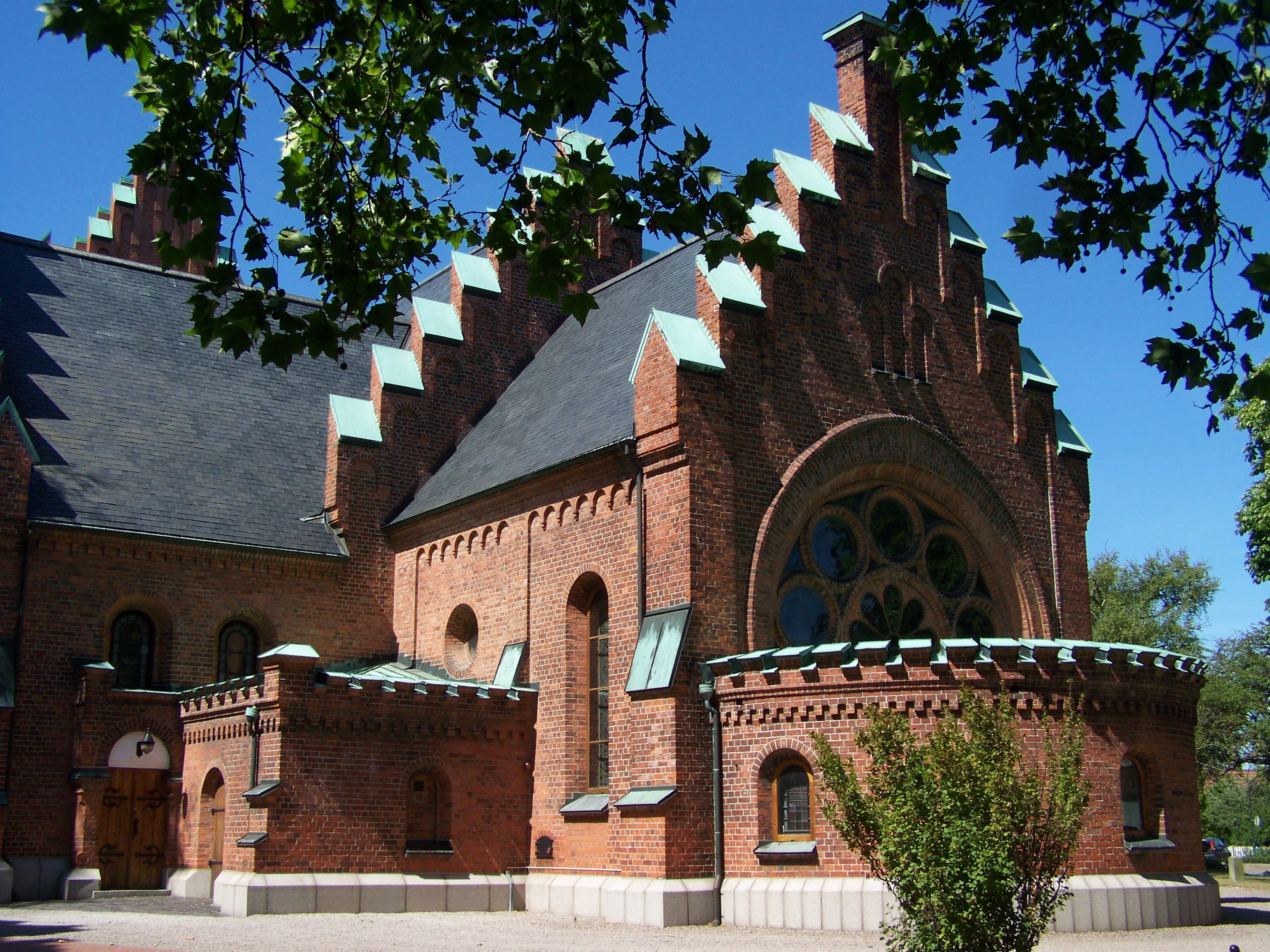 Sankt Nicolai kyrka, Trelleborg